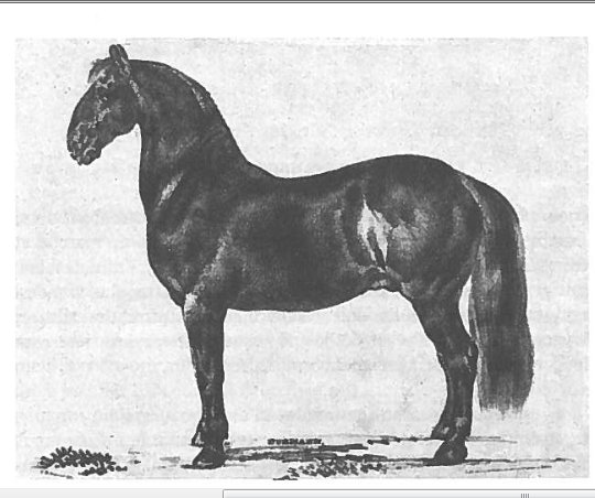 Etalon Anglo-normand exporté en Suisse dans le canton de Berne au XIXe, d'après une gravure de Joseph Simon Volmar (1796-1865)